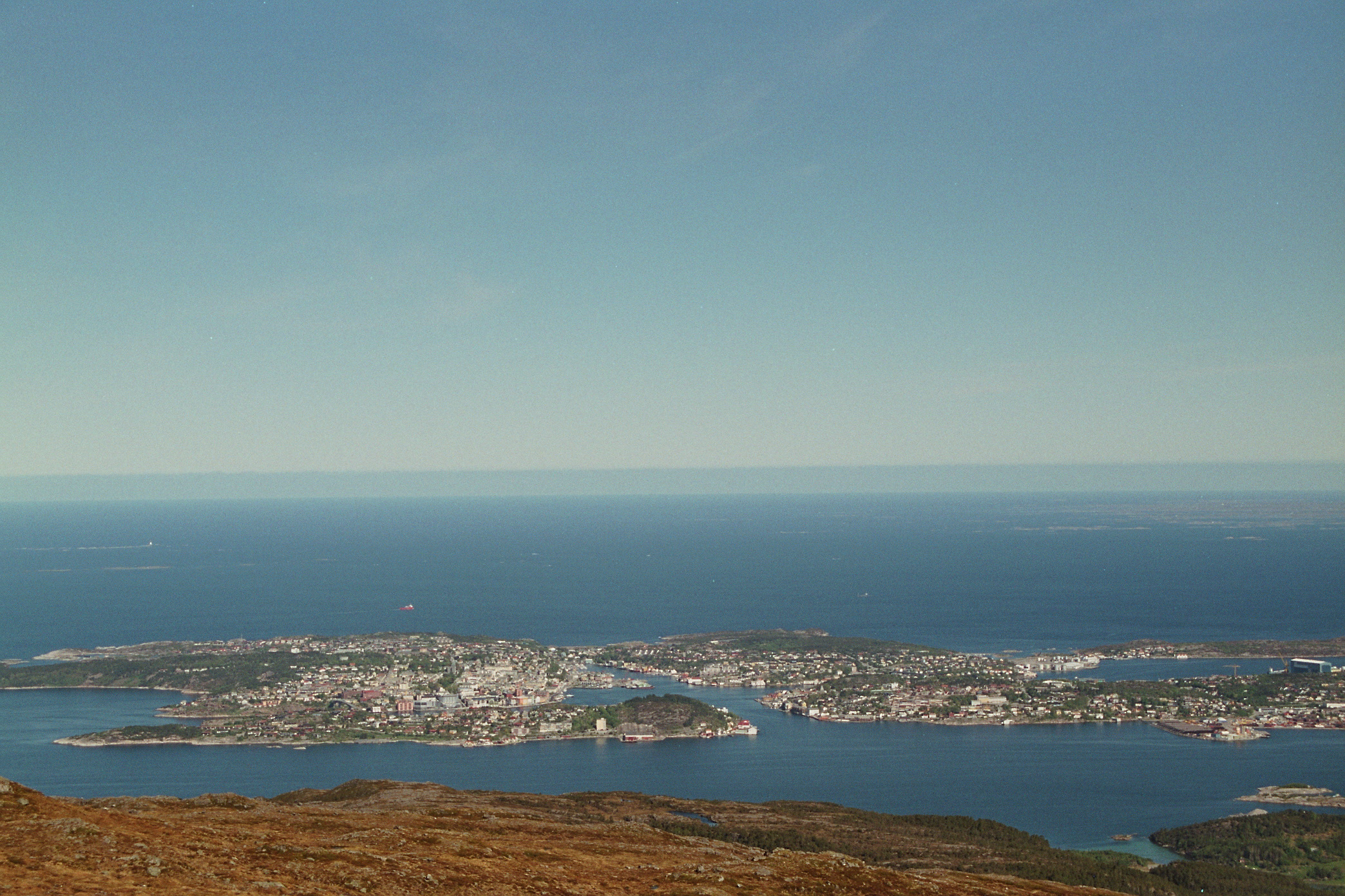 Kristiansund